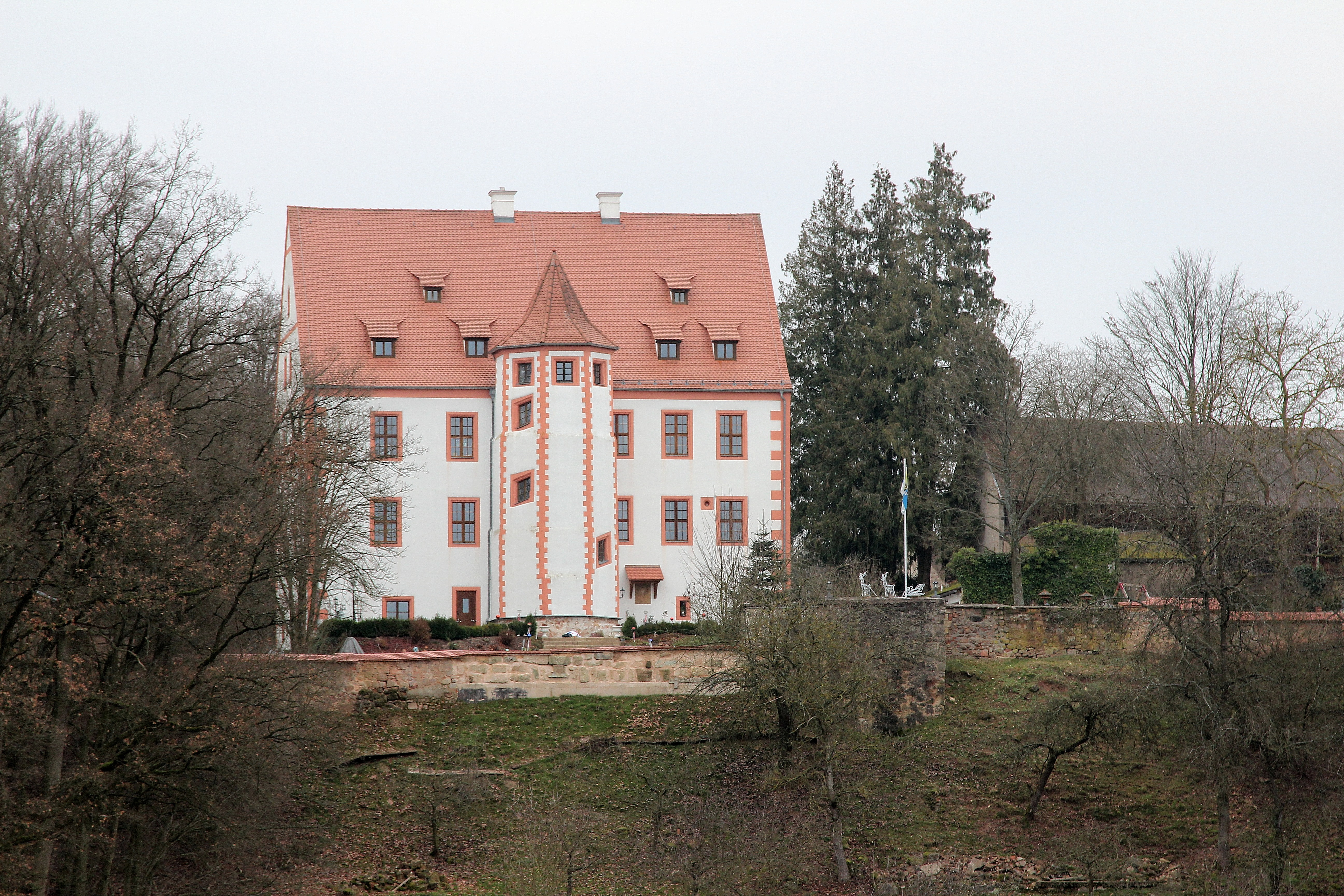 Schloss Weihersberg, Gemeinde Trabitz, Landkreis Neustadt an der Waldnaab, Oberpfalz, Bayern (2015)